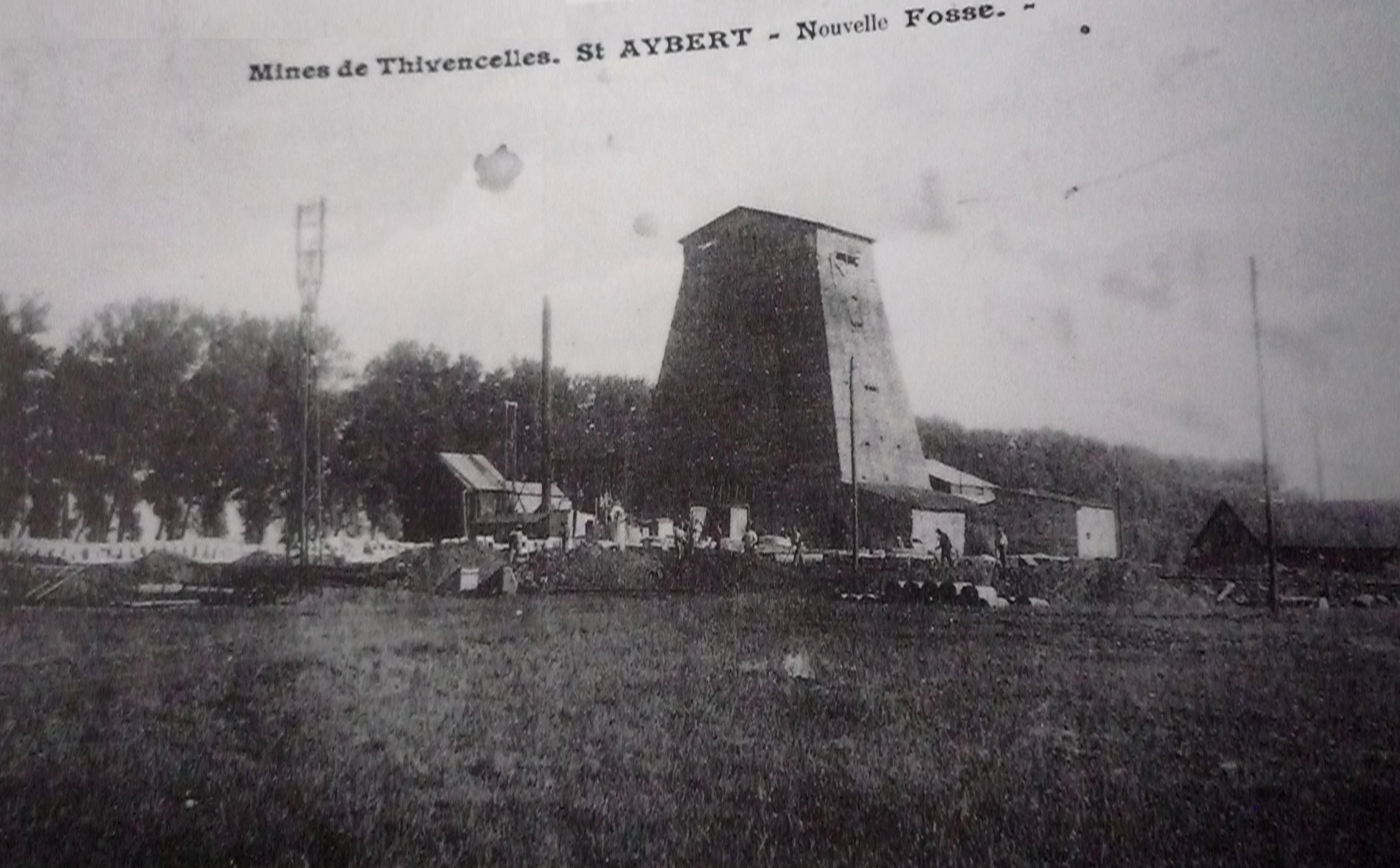 La fosse Saint-Aybert de la Compagnie des mines de Thivencelle était un charbonnage constitué d'un seul puits situé à Thivencelle, Nord, Nord-Pas-de-Calais, France.